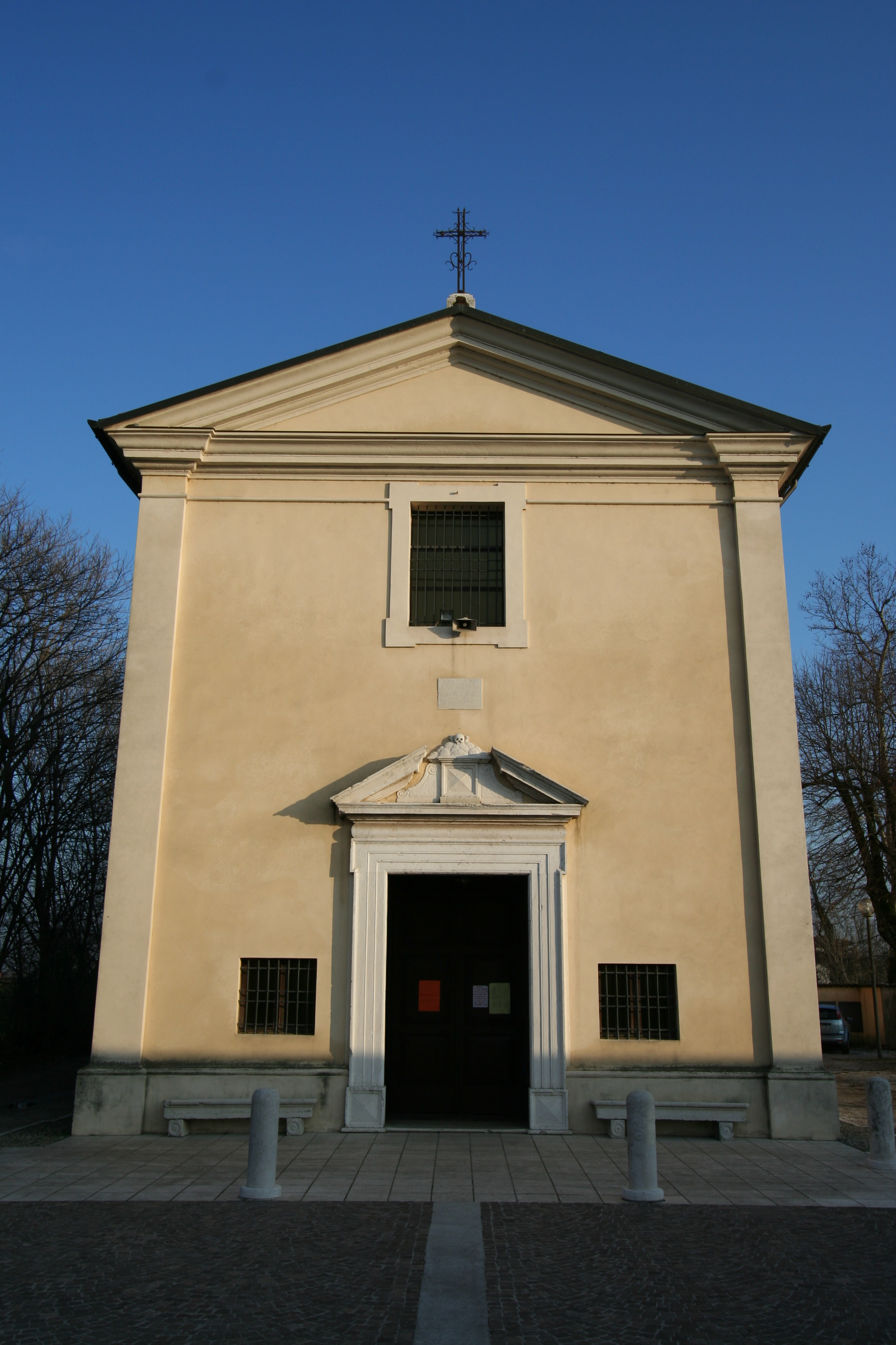 San Rocco GHEDI sec.XVII